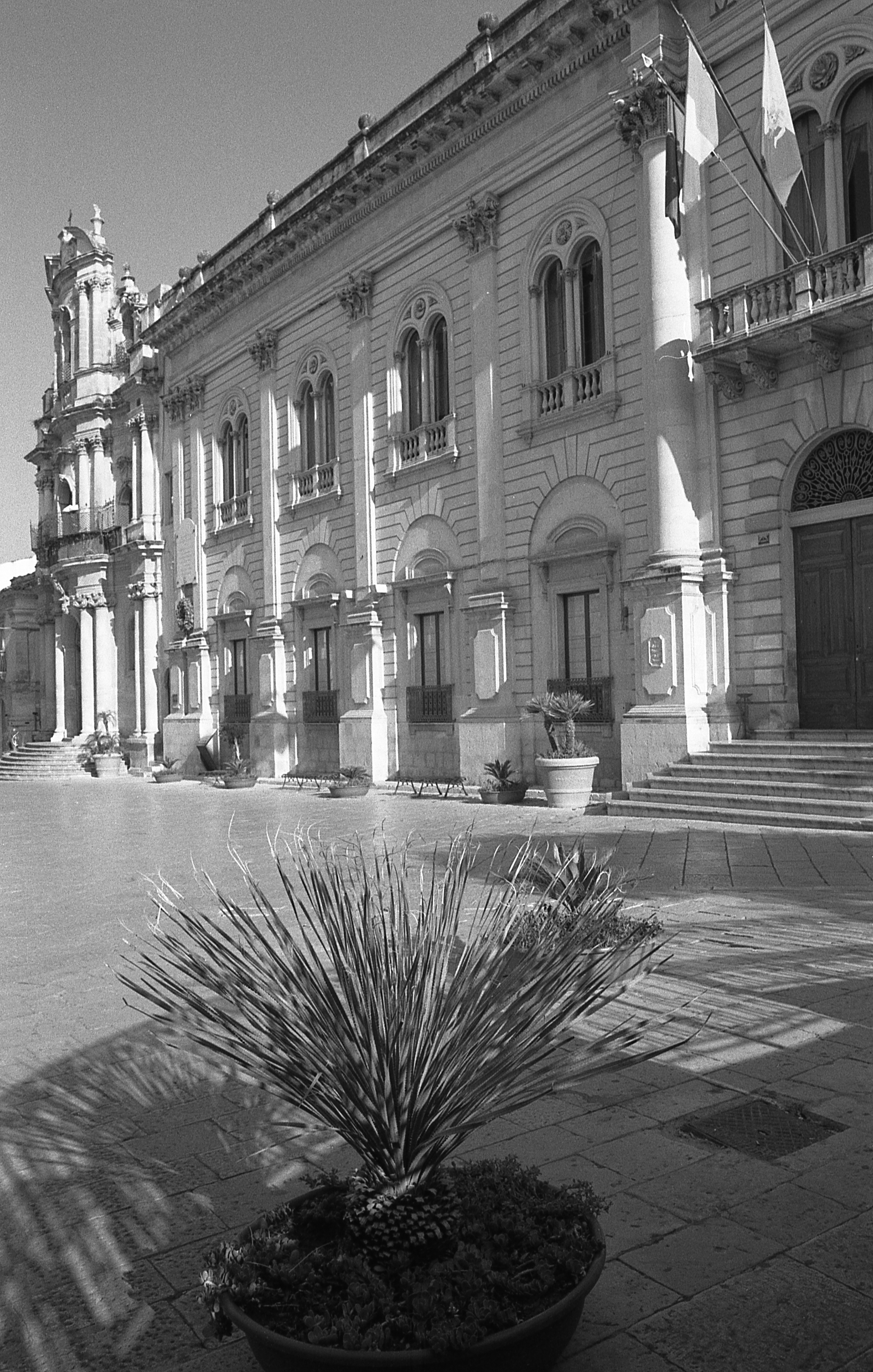 Piazza del Municipio This is a photo of a monument which is part of cultural heritage of Italy.